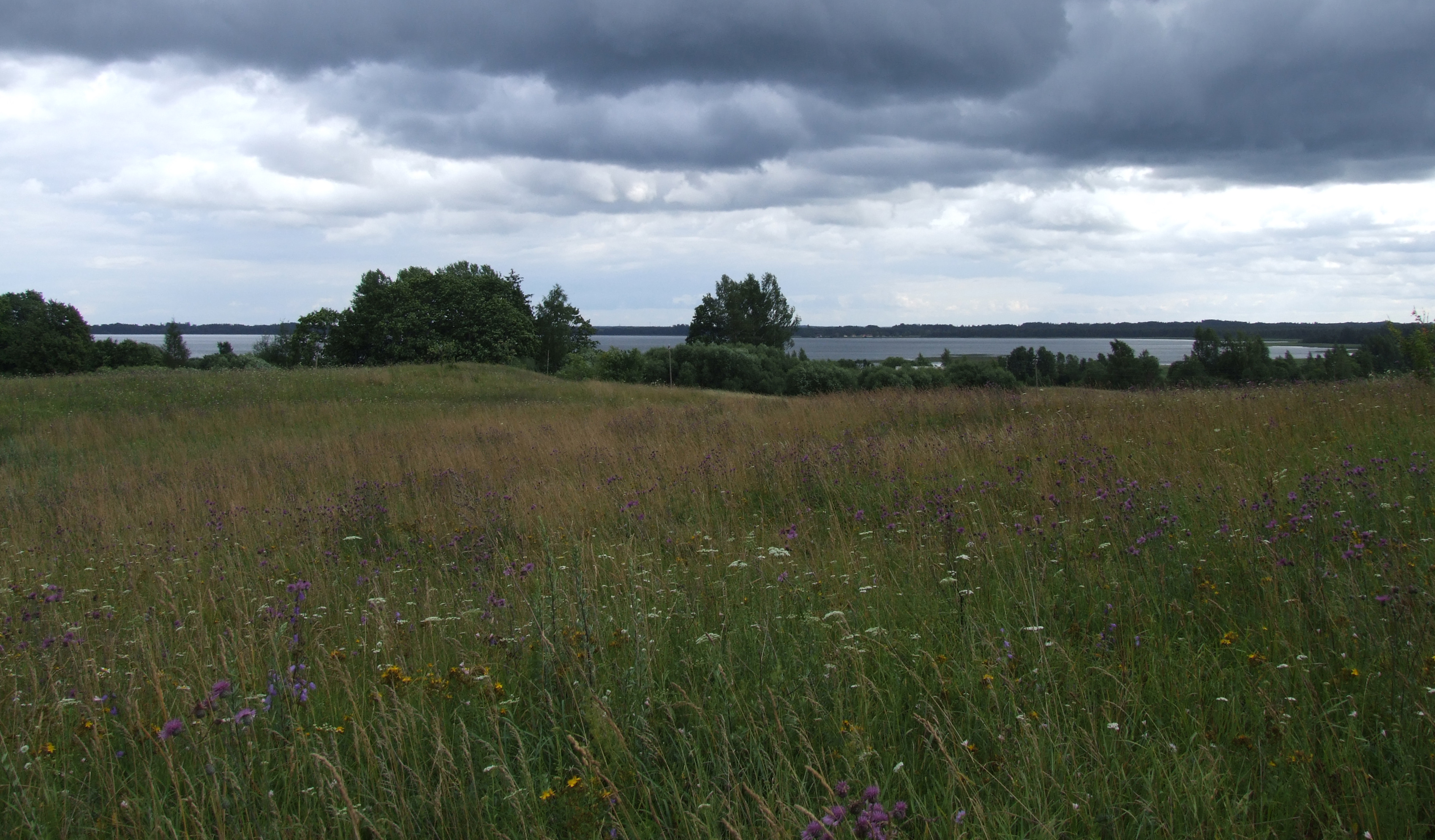 Skats uz Cirma ezeru, 14.07.2007.